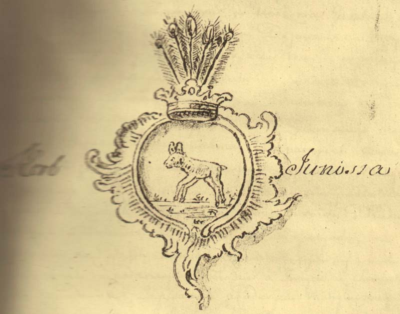 Беларуская (тарашкевіца): Аутэнтычная выява беларускага шляхэтнага гэрбу "Юноша"